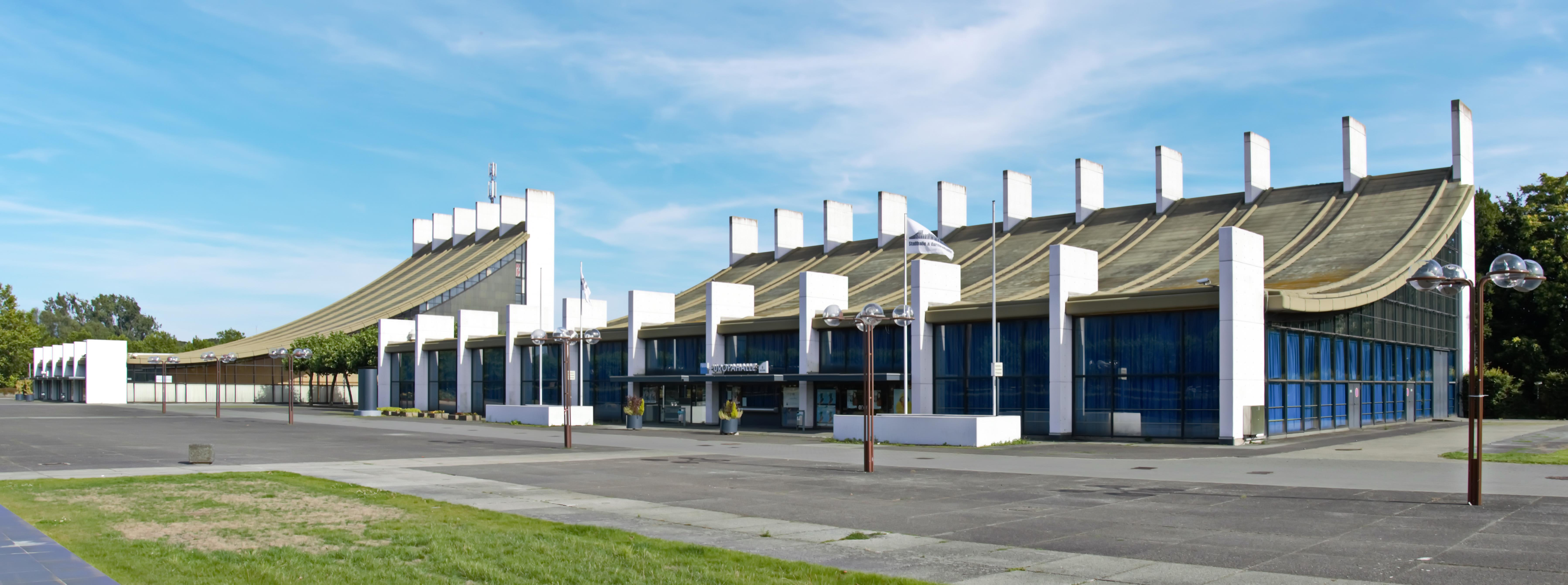 Europahalle